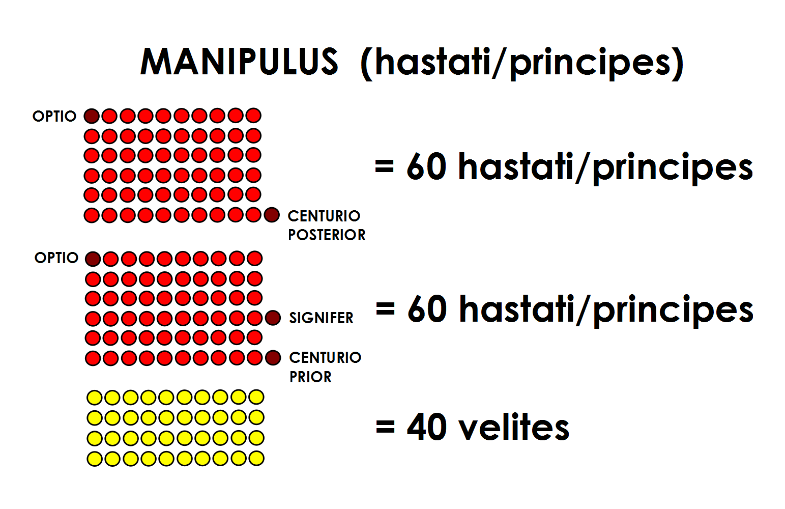 Manipolo (esercito romano) di Hastati o di Principes